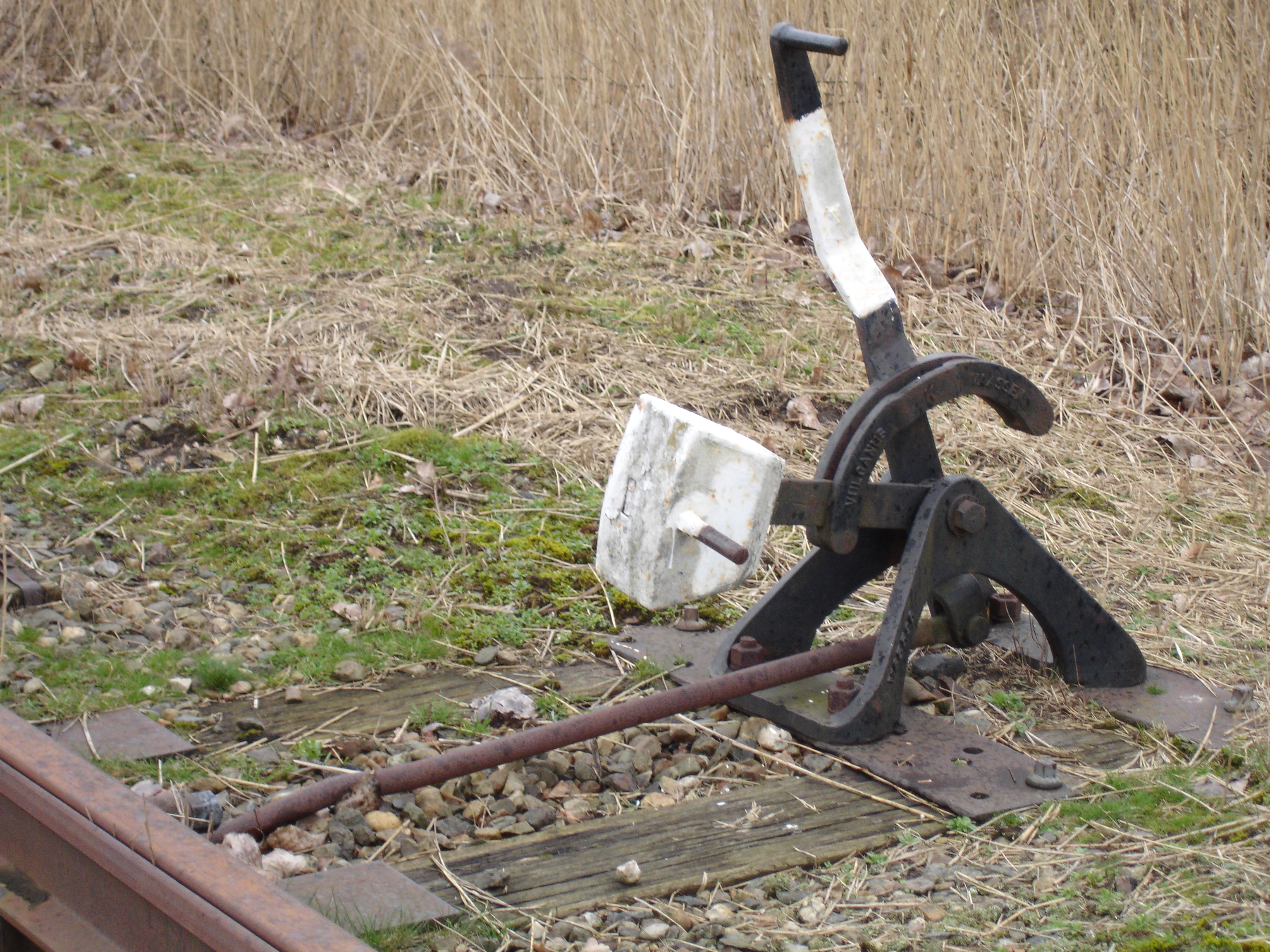 Wisselhendel